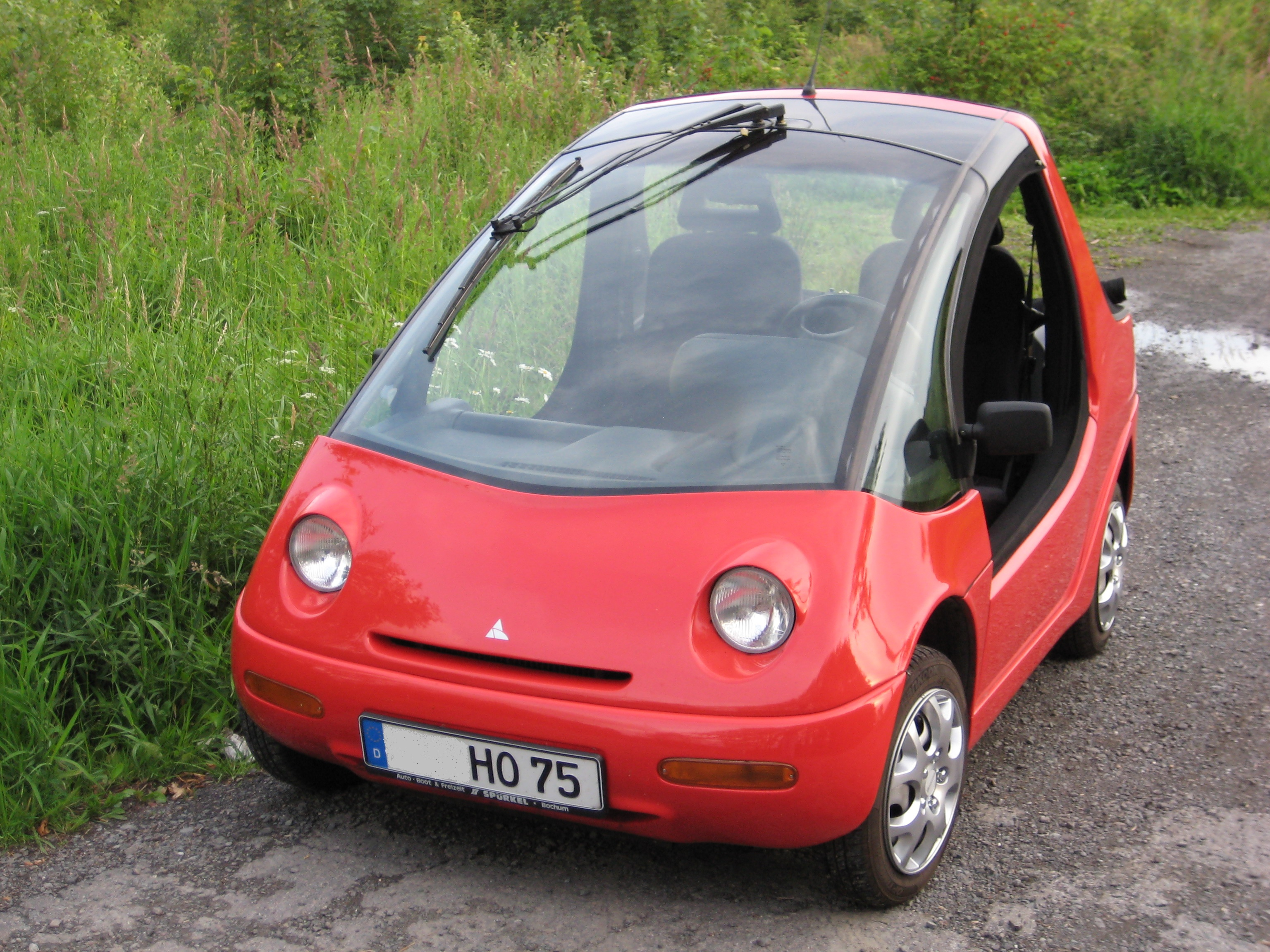 Elektroauto Hotzenblitz Buggy mit GFK-Karosserie offen als Cabrio (Stofftüren und Verdeck entfernt)